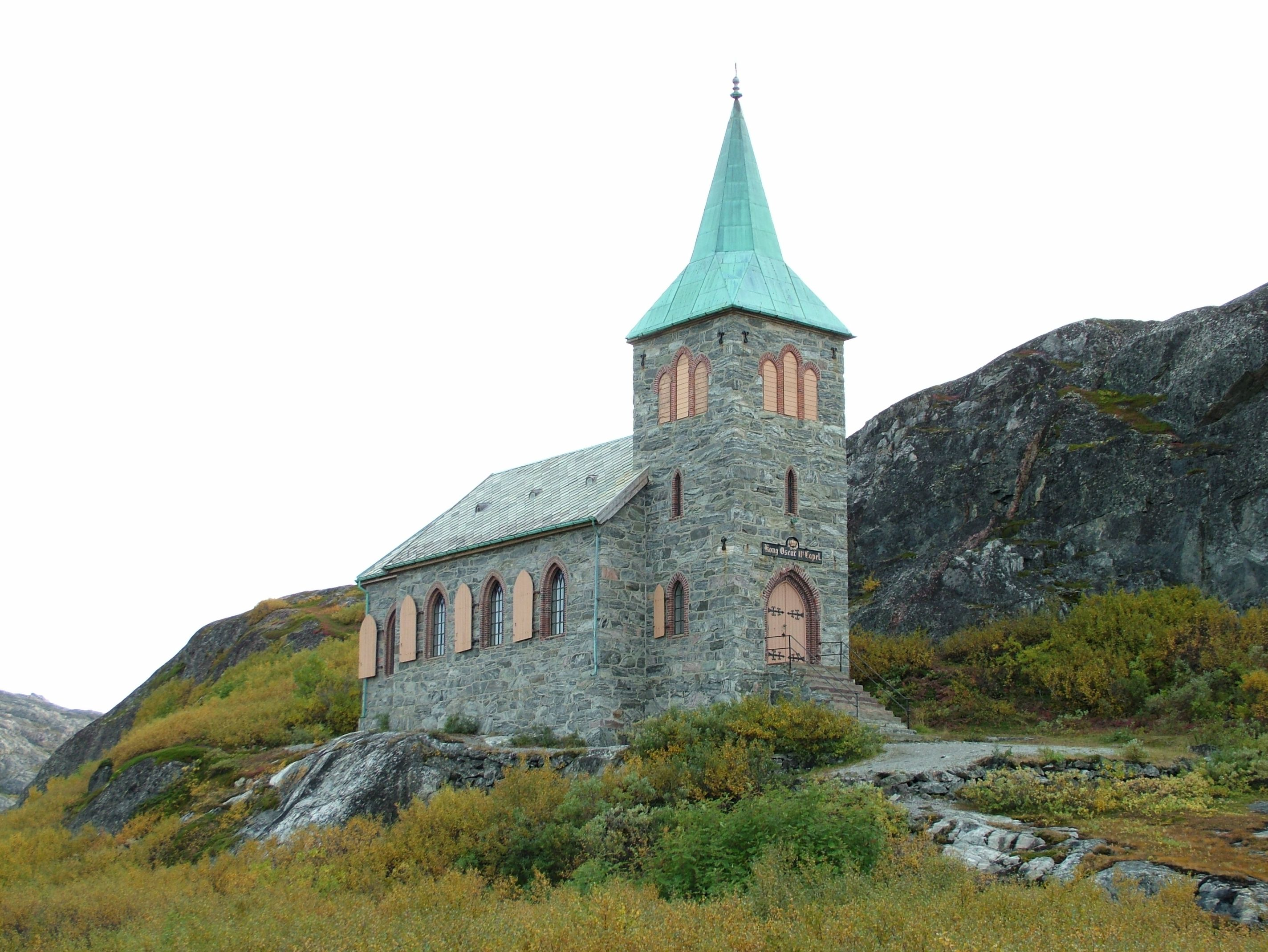 Die König Oscar II kapelle in Grense Jakobselv, Kirkenes, NorwegenNorsk bokmål: Kong Oscar IIs kapell